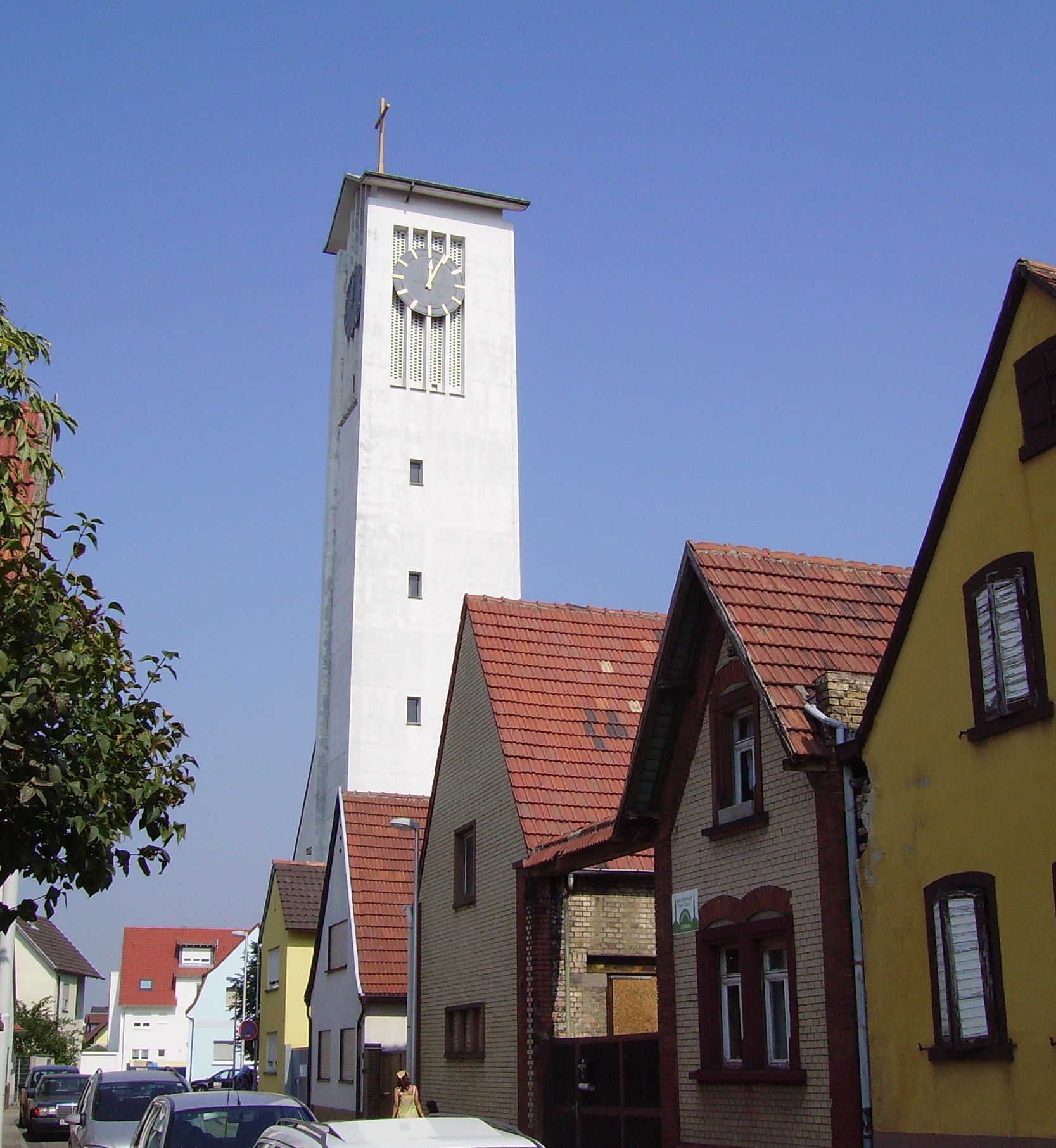 St. Medardus, Mutterstadt in Rheinland-Pfalz (Germany)